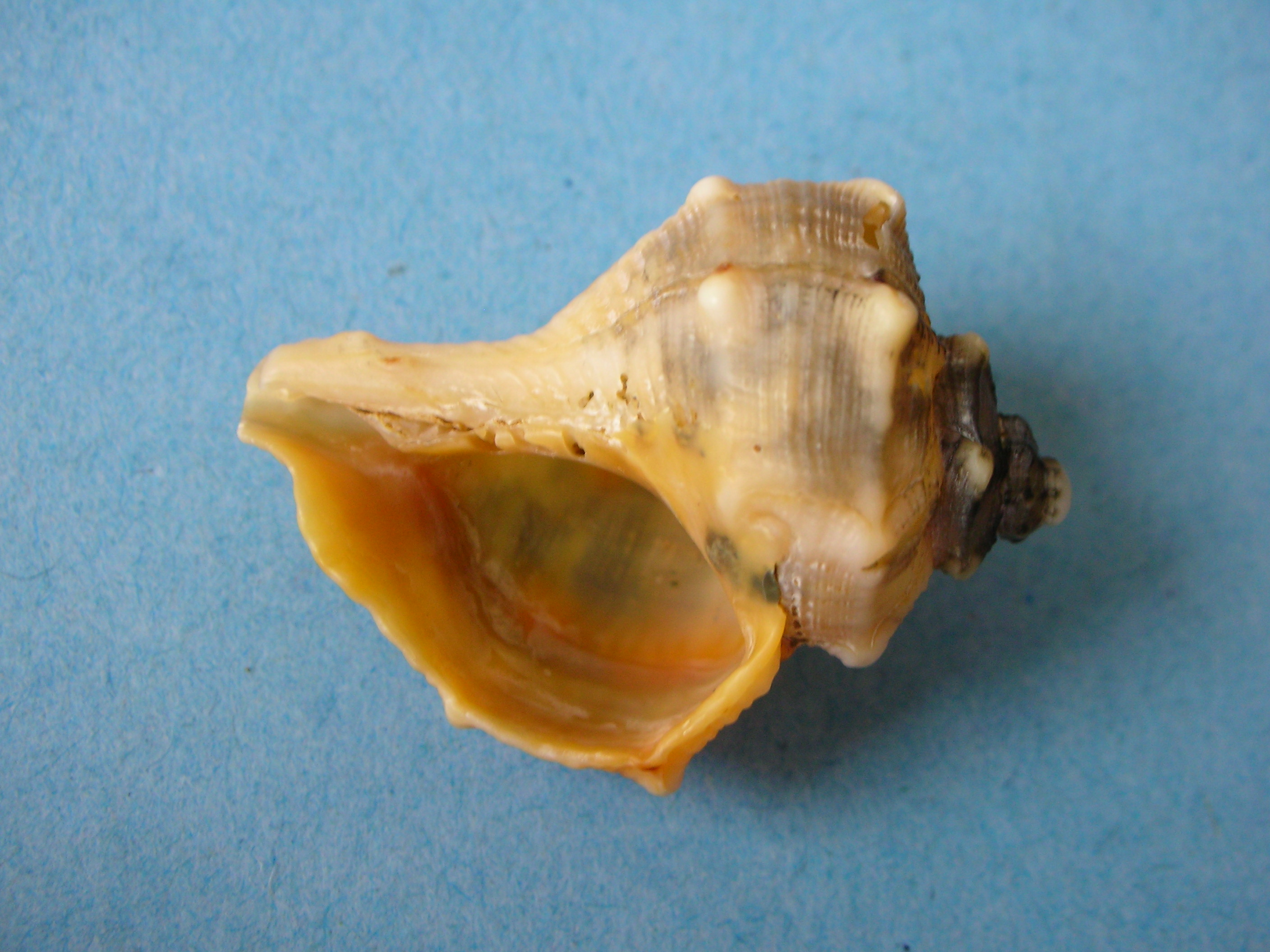 Haustellum brandaris, loc. Torregaveta, Bacoli (NA) Italy